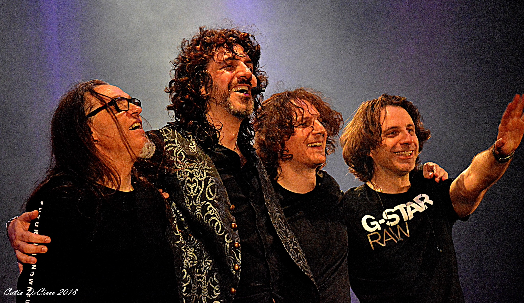 Offizielles Bandfoto